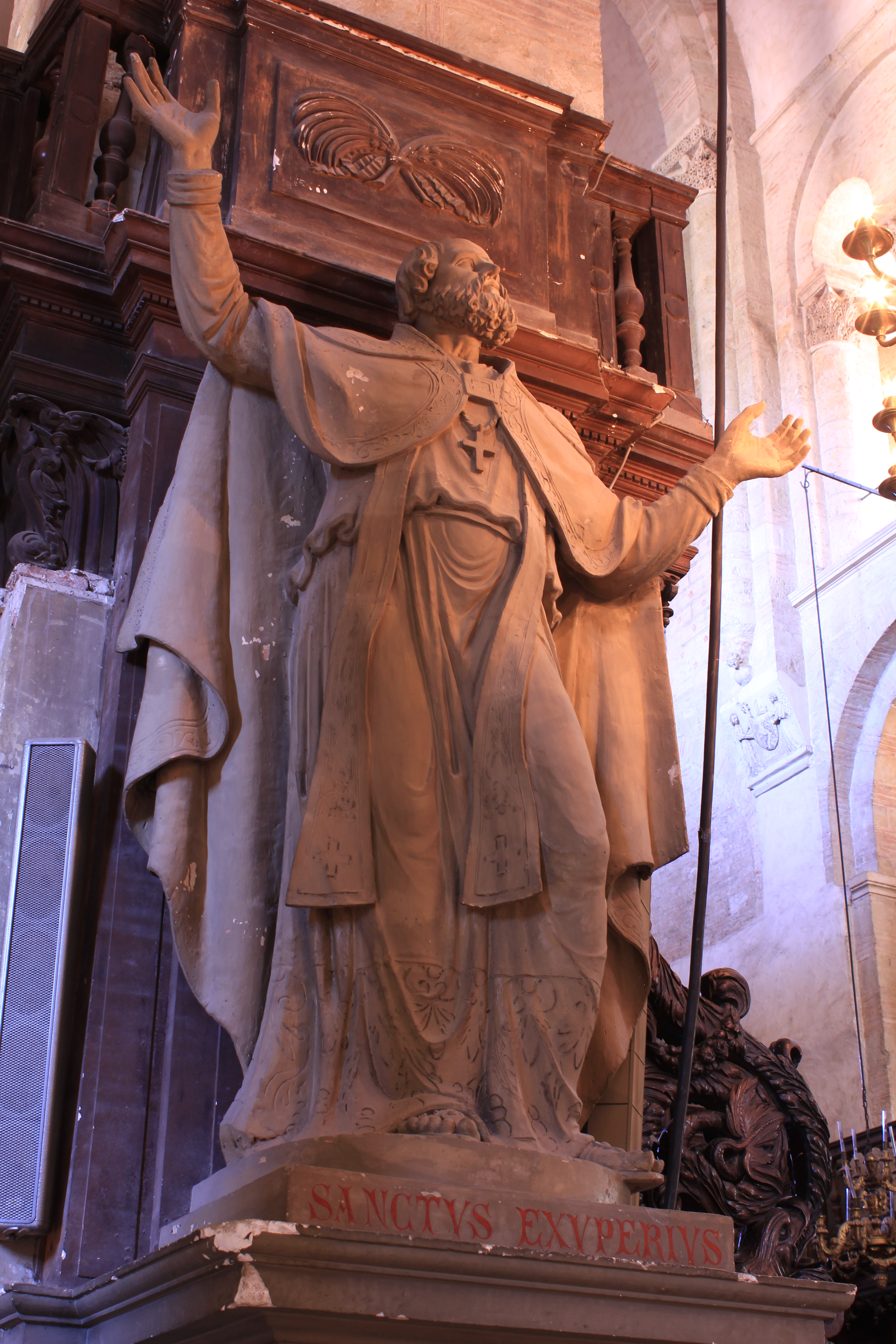 Basilique Saint-Sernin - Statue de Saint Exupère